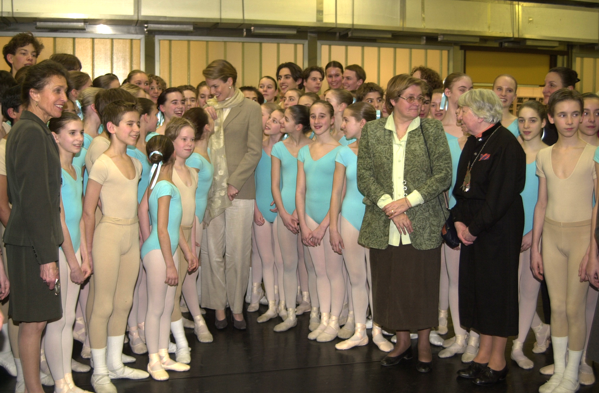 Inventarisnummer Felixarchief: 539 # 203 Bezoek van Prinses Mathilde aan de Stedelijke Balletschool (2001).Op de foto: prinses Mathilde (midden, met sjaal); Leona Detiège (rechts, met bril); Jeanne Brabants (rechts, met zwarte jurk).